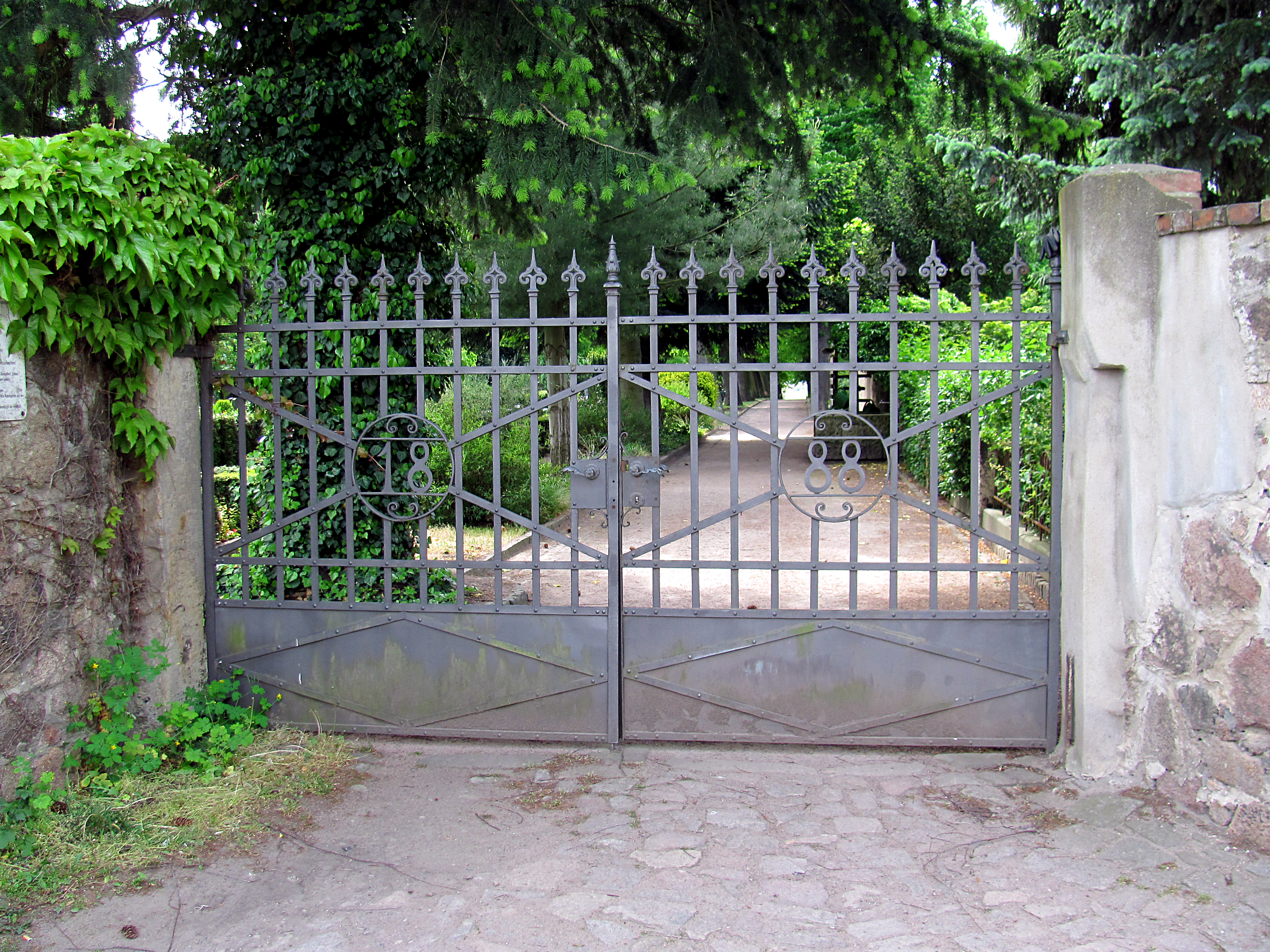 Radebeul-Kötzschenbroda, Friedhof Radebeul-West, Tor von 1888